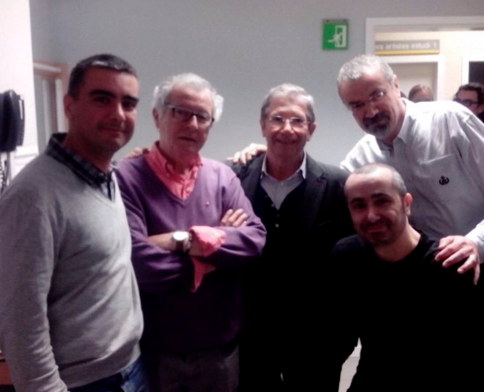 Els dibuixants Ferran Martin, Fer, Ermengol i Kap, amb l'actor Joan Pera.